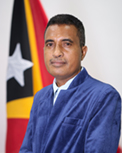 Gabriel Soares, Abgeordneter des Nationalparlaments Osttimros